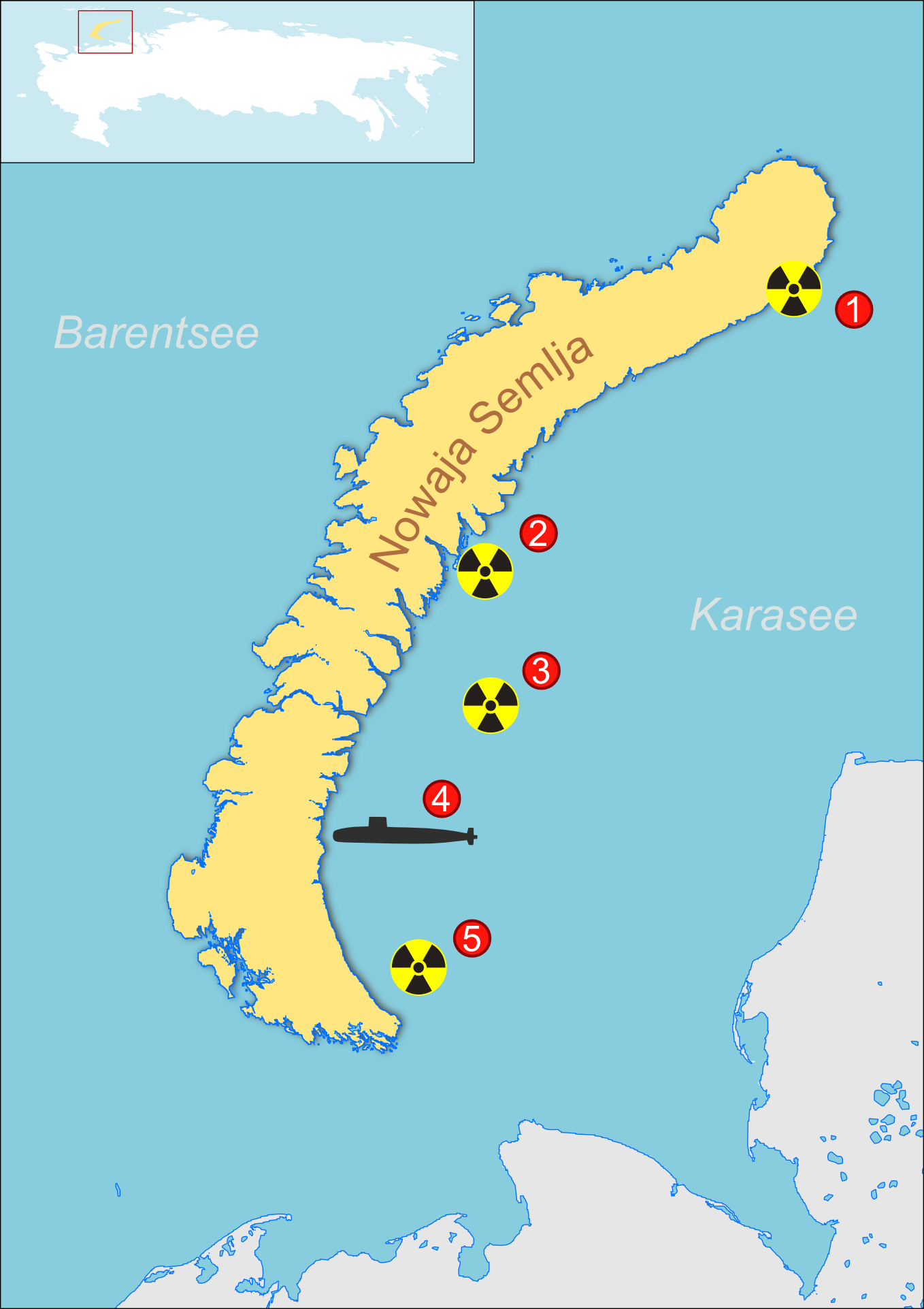 Verklappung von Atommüll bei Nowaja Semlja Legende: 1: 2 Reaktoren ohne verbrauchte Kernbrennstoffe 2: 2 Reaktoren ohne verbrauchte Kernbrennstoffe und 60% der Kernbrennstoffe des Eisbrechers Lenin in Containern 3: 6 Reaktoren mit Uran, 10 ohne Kernbrennstoffe, 11.000 Container mit radioaktiven Abfällen 4: Unterseeboot K-27 mit zwei Reaktoren 5: 3 Reaktoren mit und 3 ohne Kernbrennstoffe